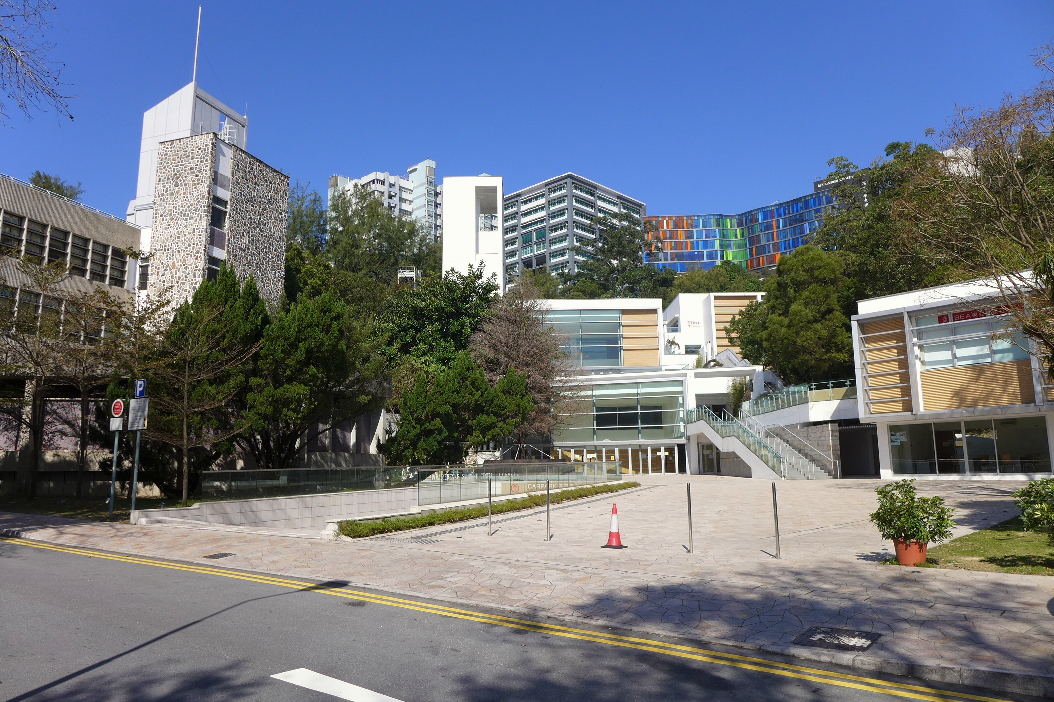 Pommerenke Student Centre